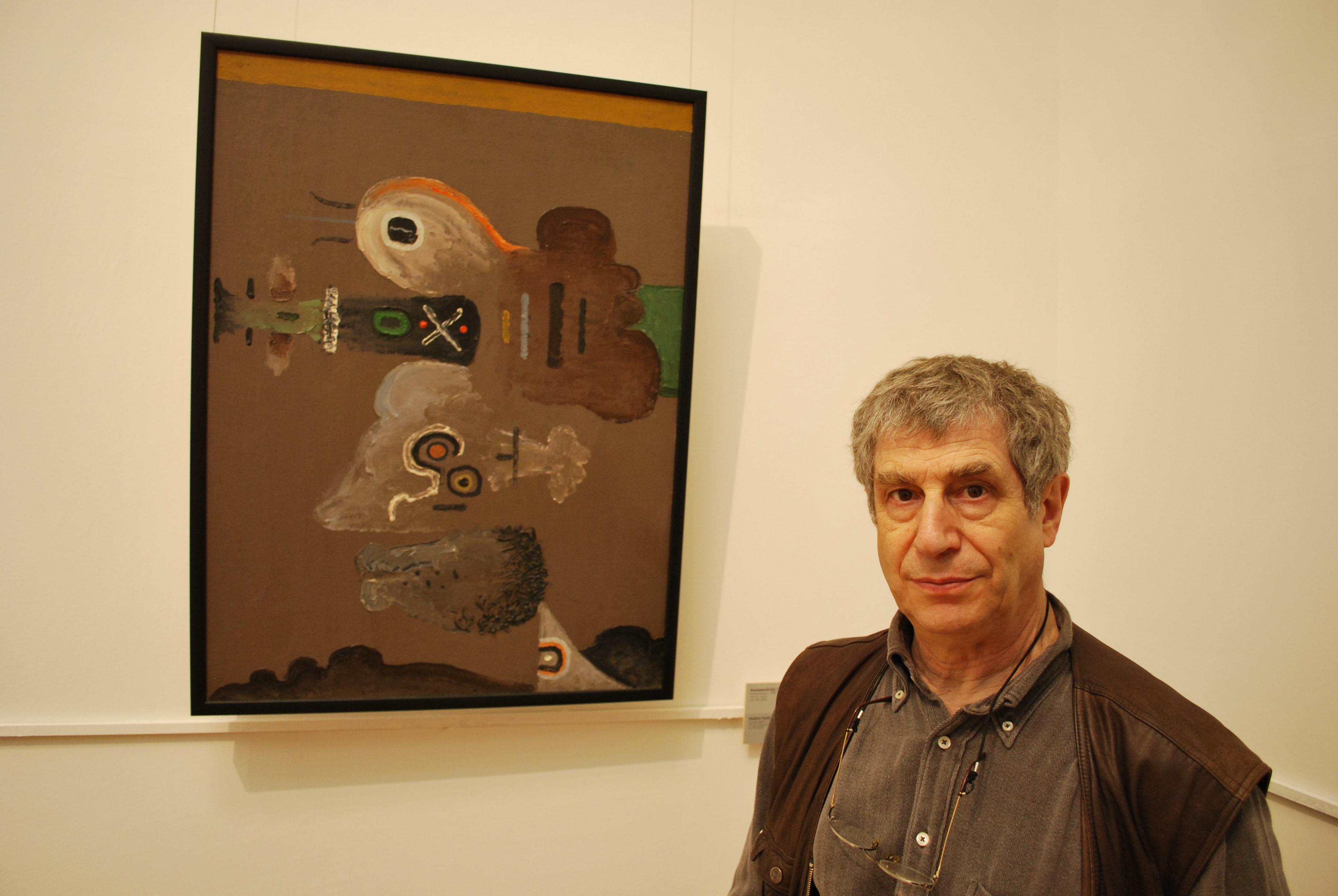 Владимир Янкилевский. Госудларственная Третьяковская галерея, Москва. Апрель 2010 года.